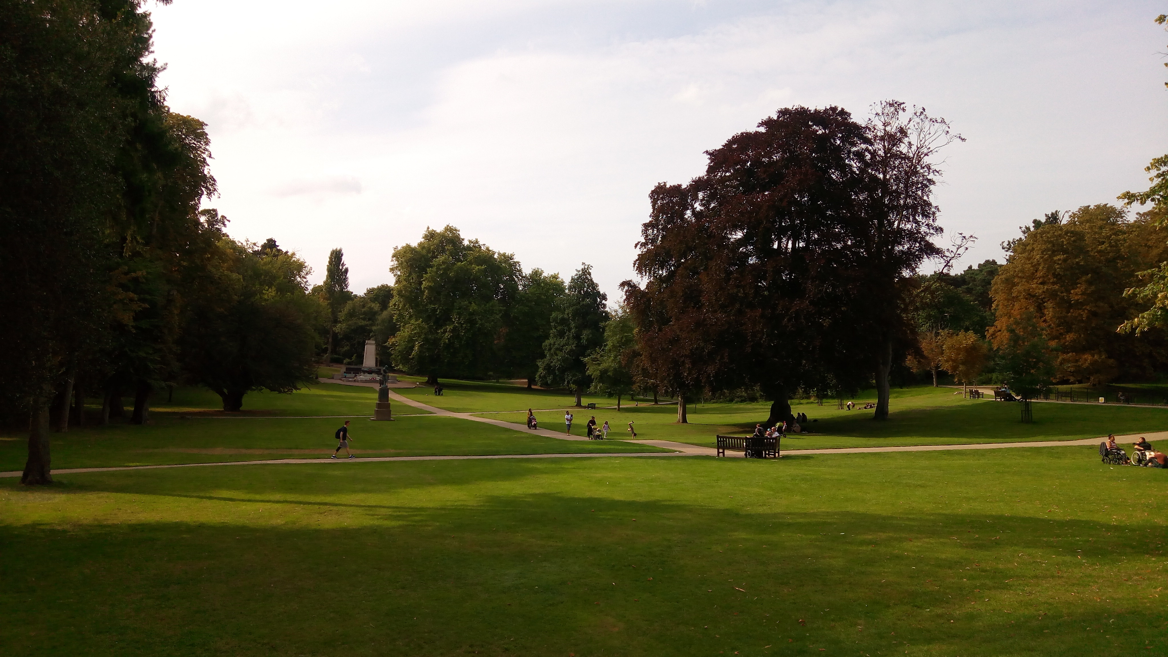 Christchurch Park, Ipswich, Suffolk, England